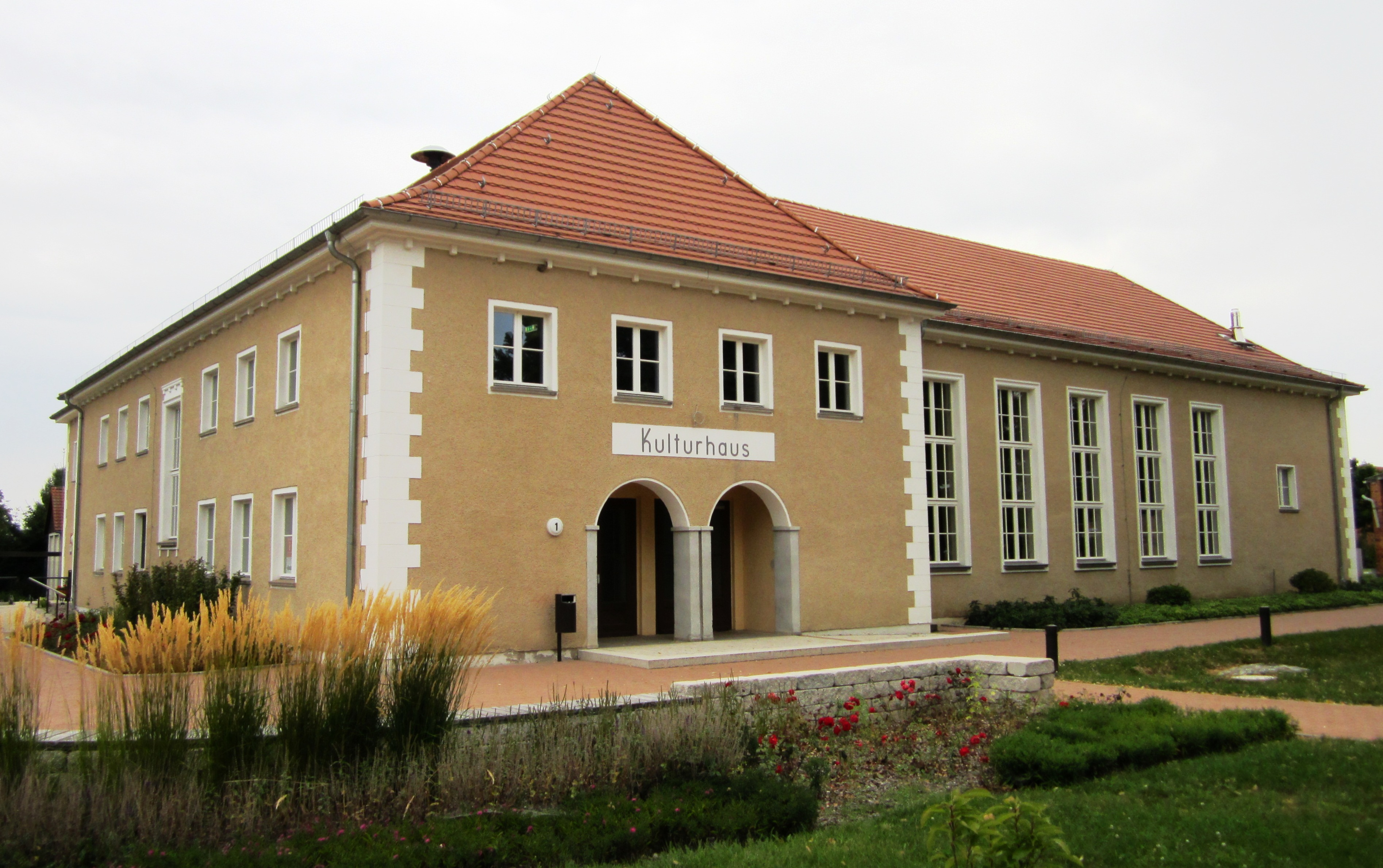 denkmalgeschütztes Gebäude in Lebus, Kulturhaus